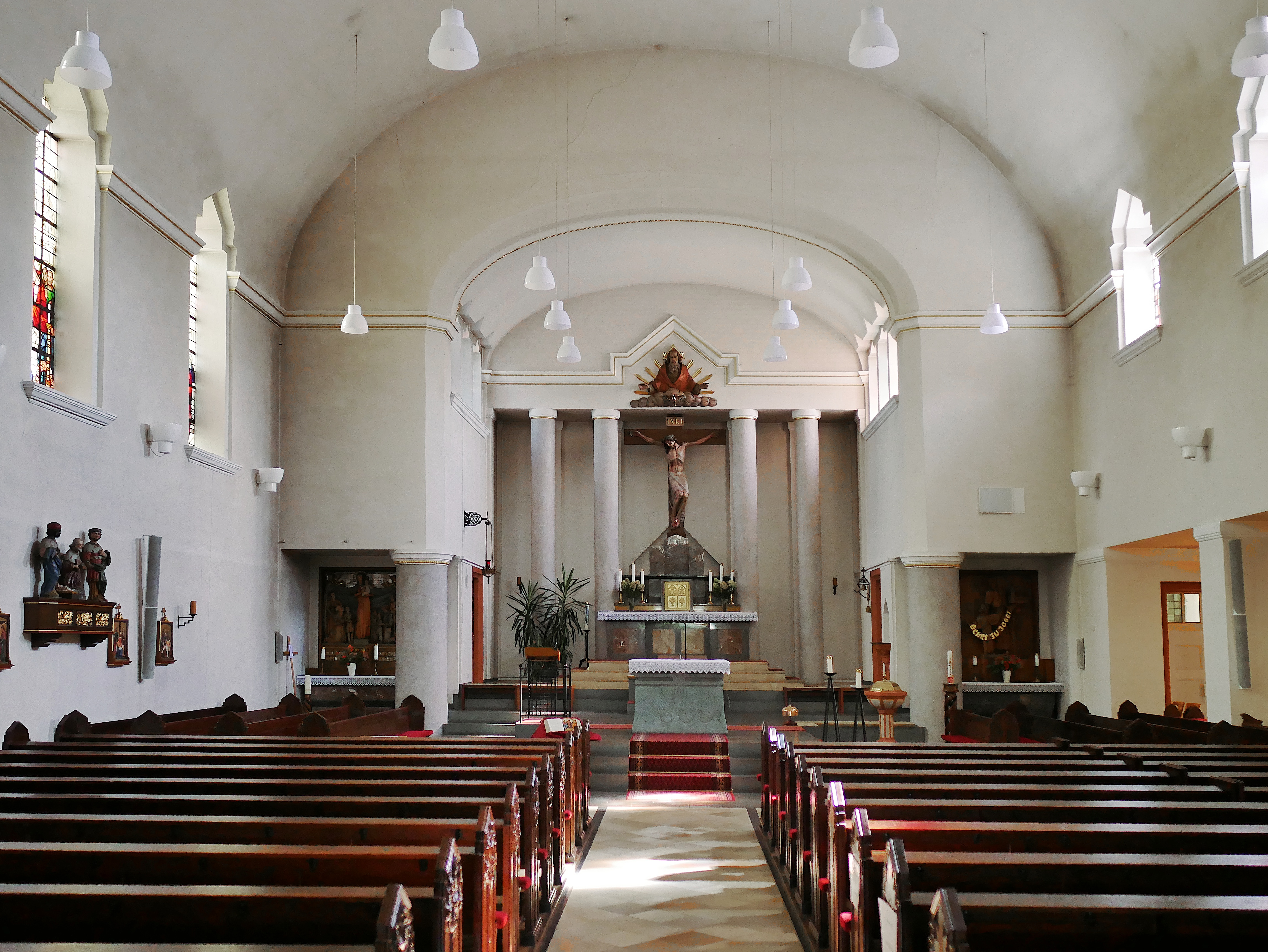 Erscheinung des Herrn (Gusenburg) - Innenraum